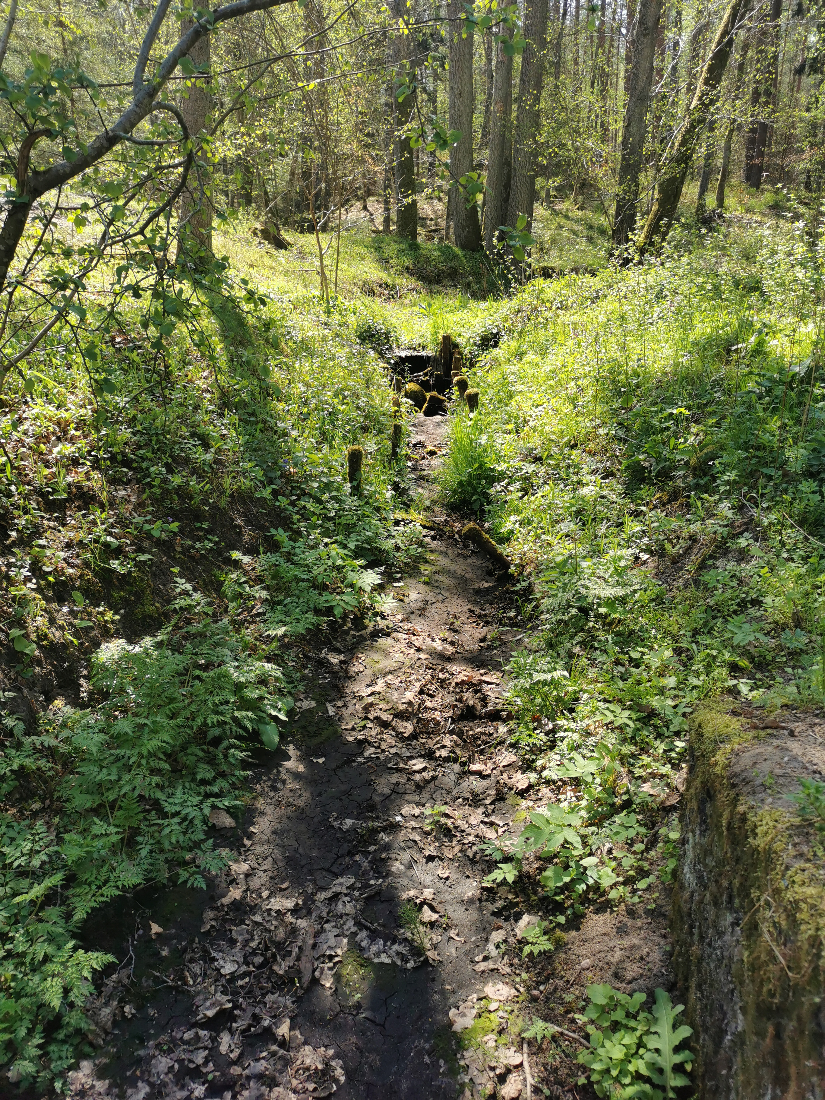 Częściowe suche koryto strumienia Krajanka